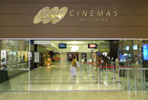 Vista da fachada do GNC Cinemas de Balneário Camboriú, SC